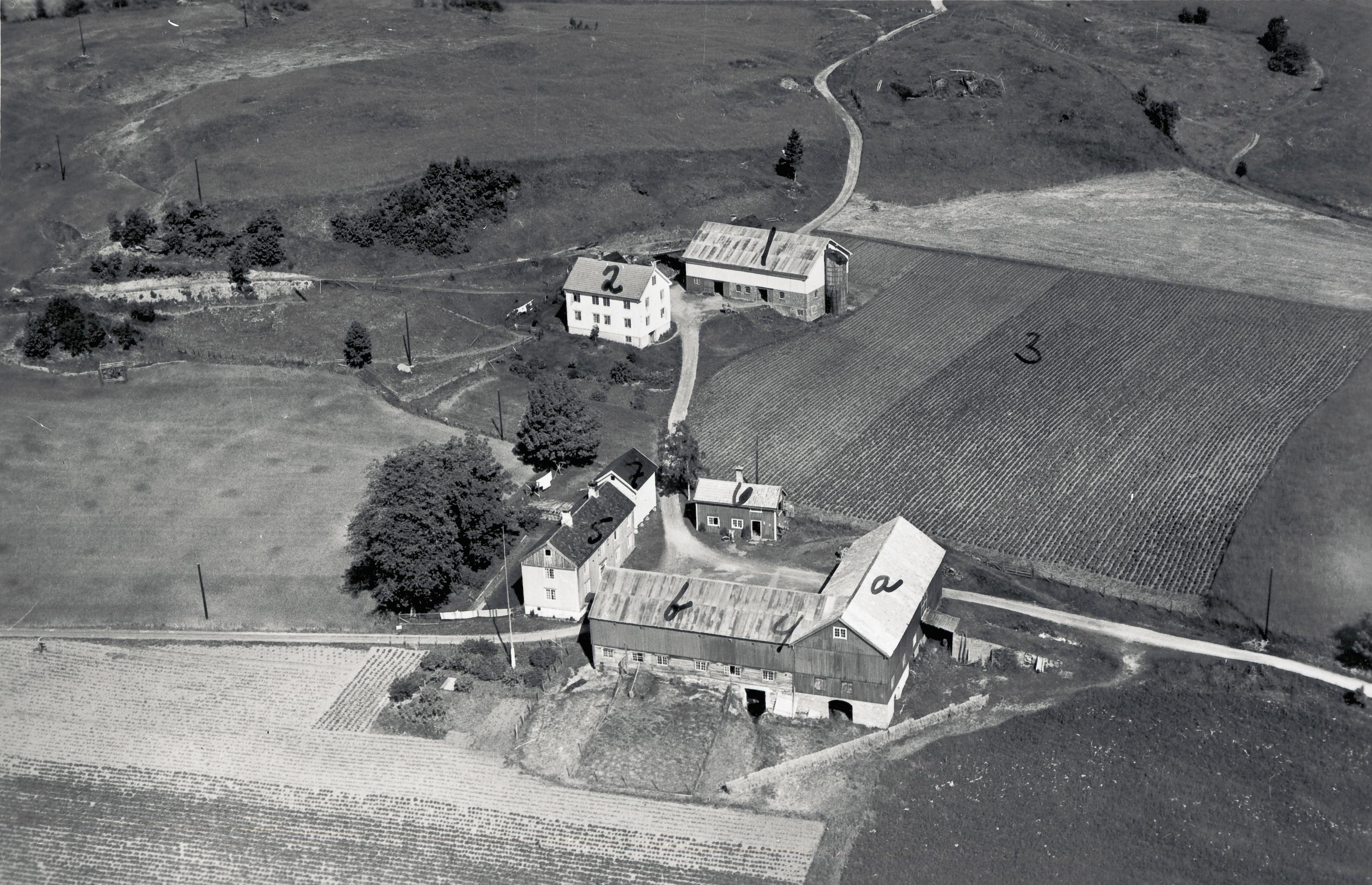 Gårdsbruk i Leinstrand, Ugla. Flatås søndre. To gårder med våningshus, fjøs, veier, jorder. Flatåsgårdene ble utstykket i 1960- og 1970-årene, og har gitt navn til bydelen Flatåsen